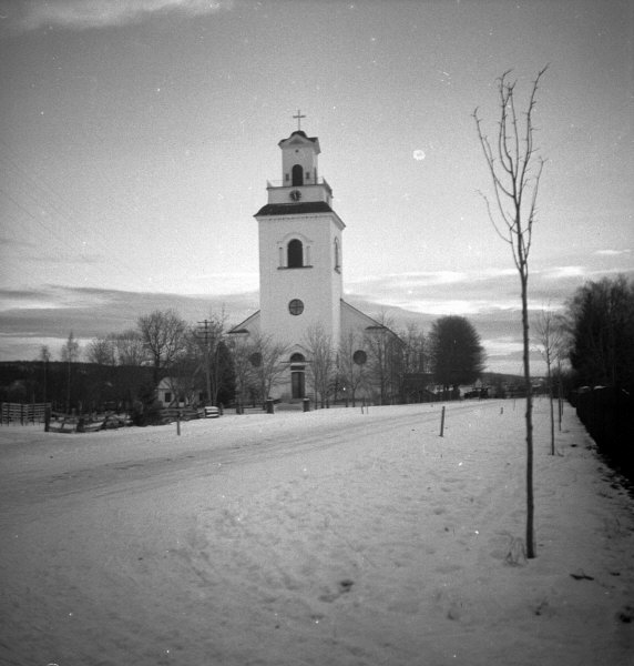 Kyrkan från väster.